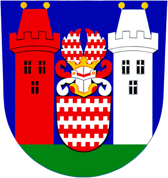 Znak města Tovačov